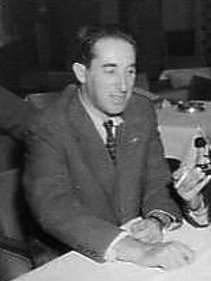 Aankomst op Schiphol van regisseur Grigori Kozin